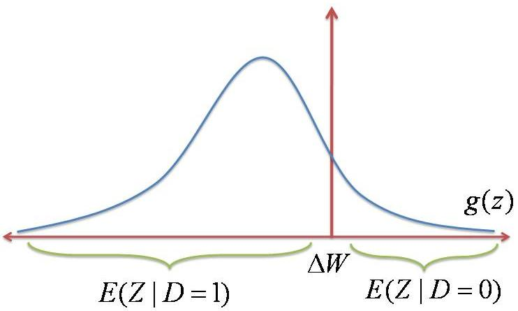 Distorsión en \Delta W